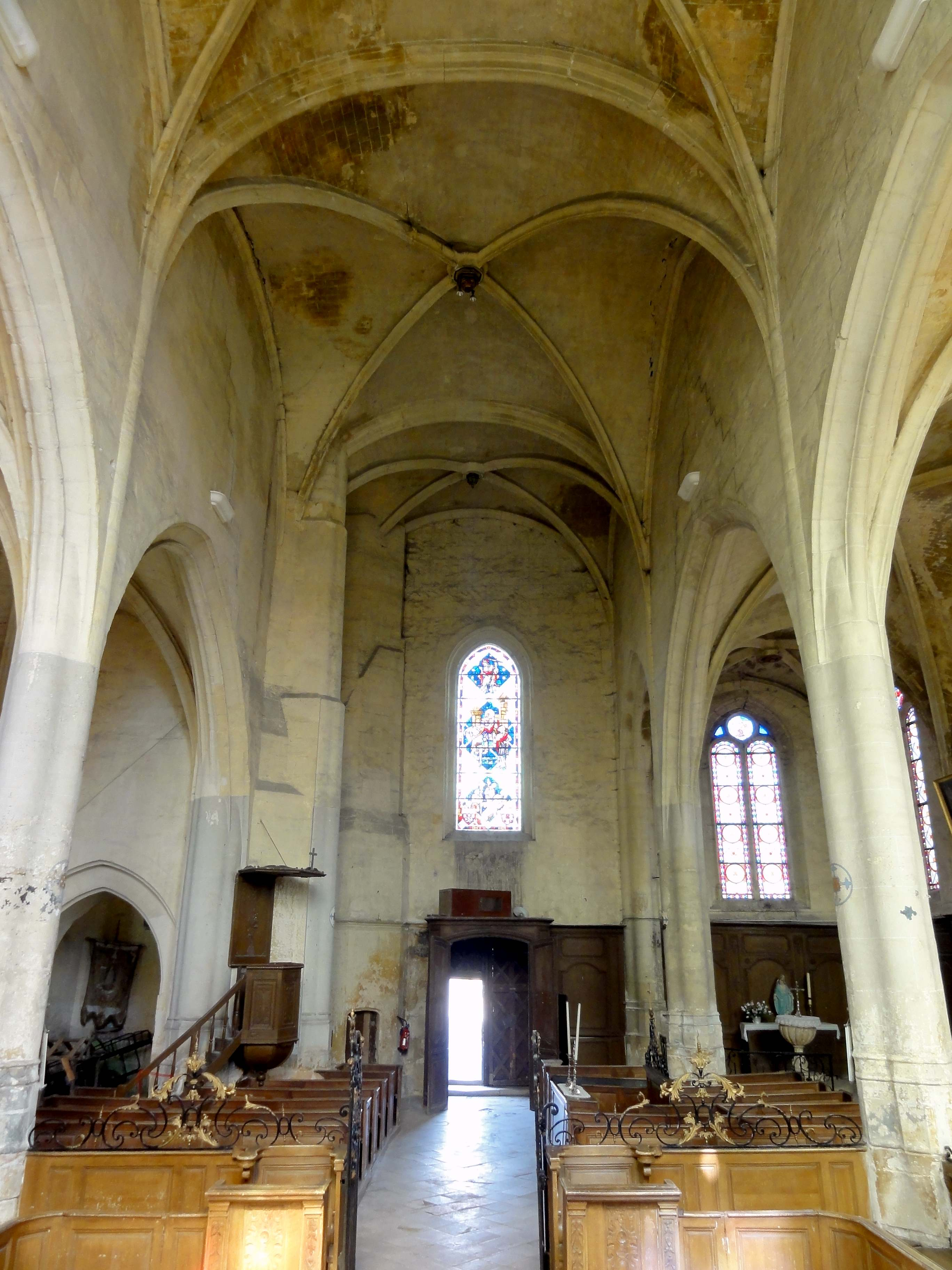 Intérieur de l'église Saint-Martin de Versigny (voir titre).